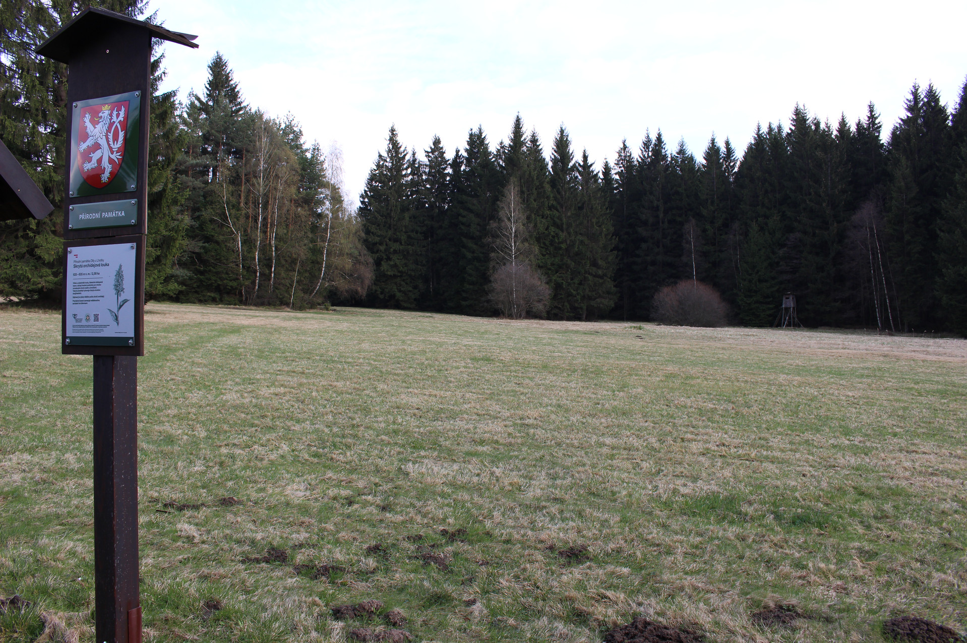 přírodní památka Díly u Lhotky, CHKO Žďárské vrchy, okres Žďár nad Sázavou, kraj Vysočina